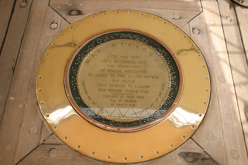 Kelvin Kay user:kkmd